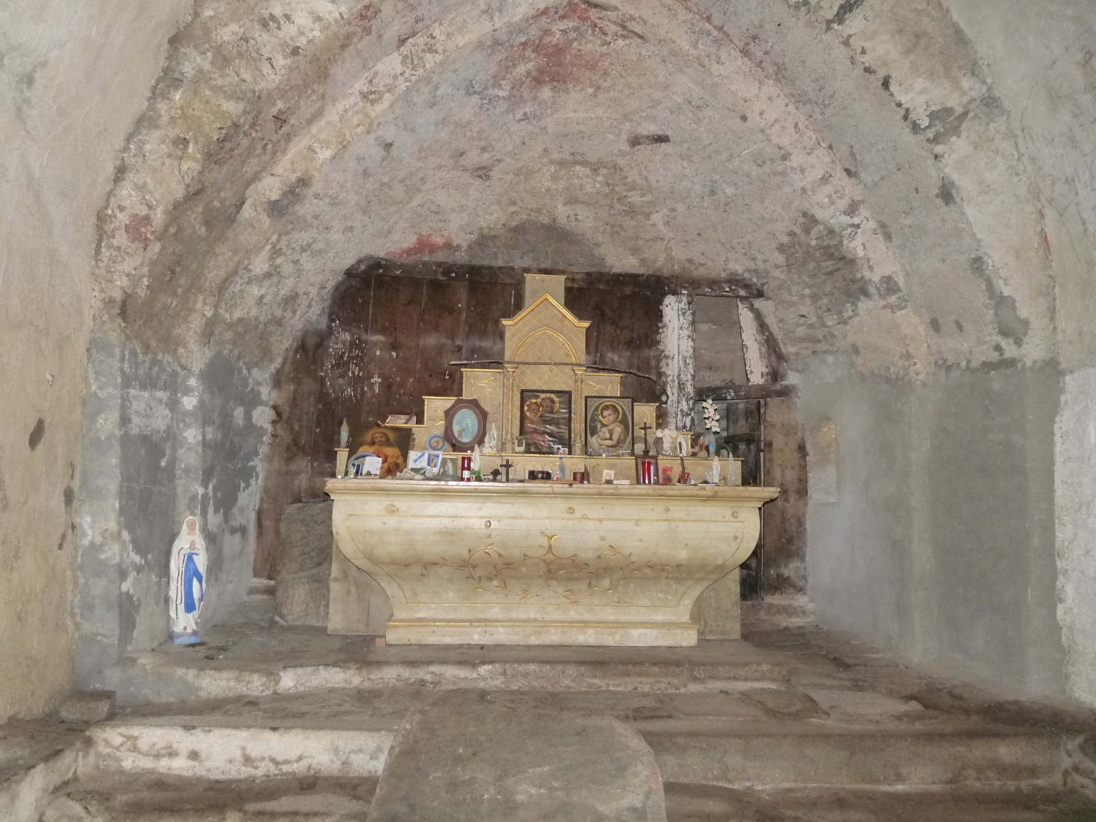 Chapelle St-Martin d'Envalls, Pyrénées-Orientales, France